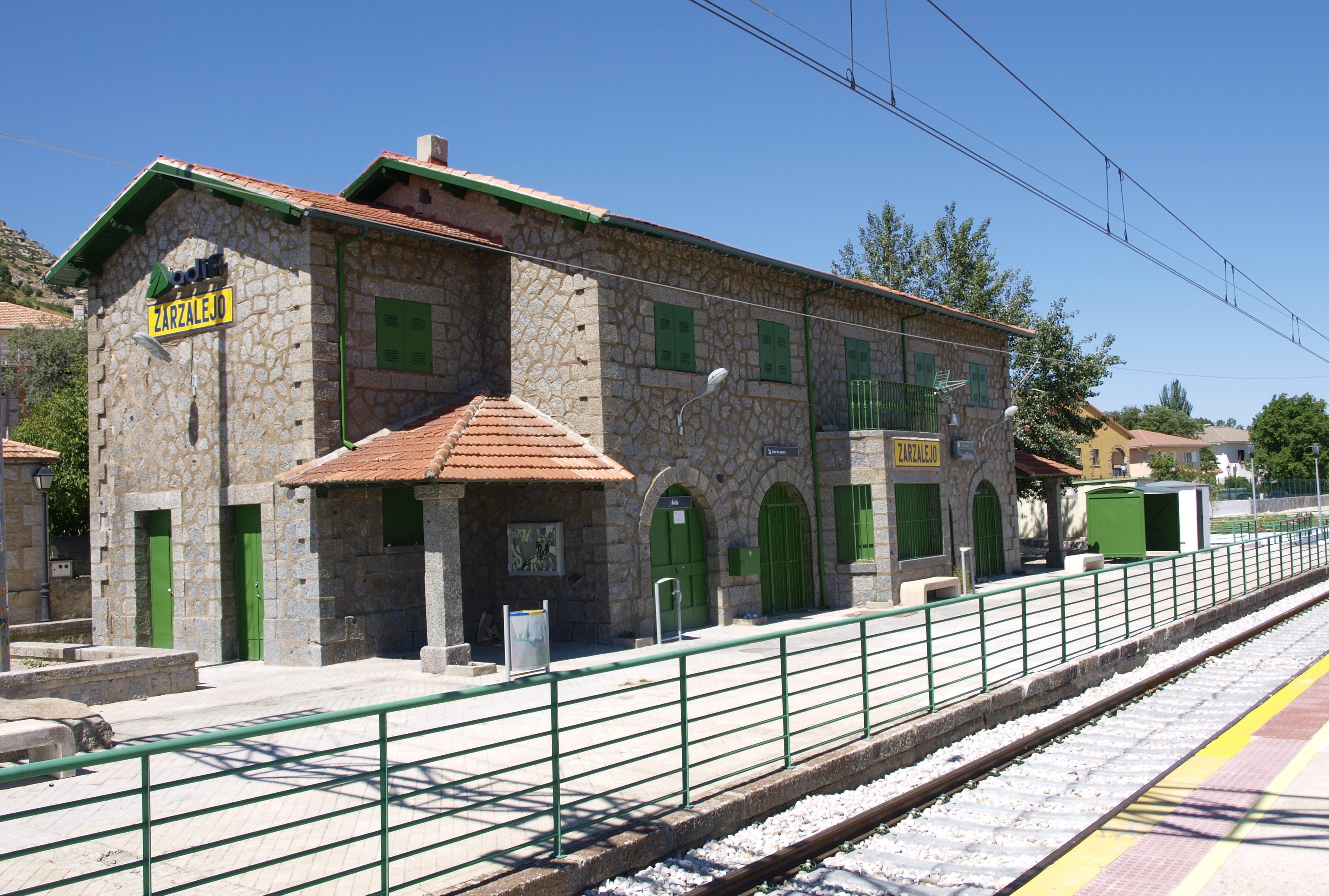 Estación de Zarzalejo.